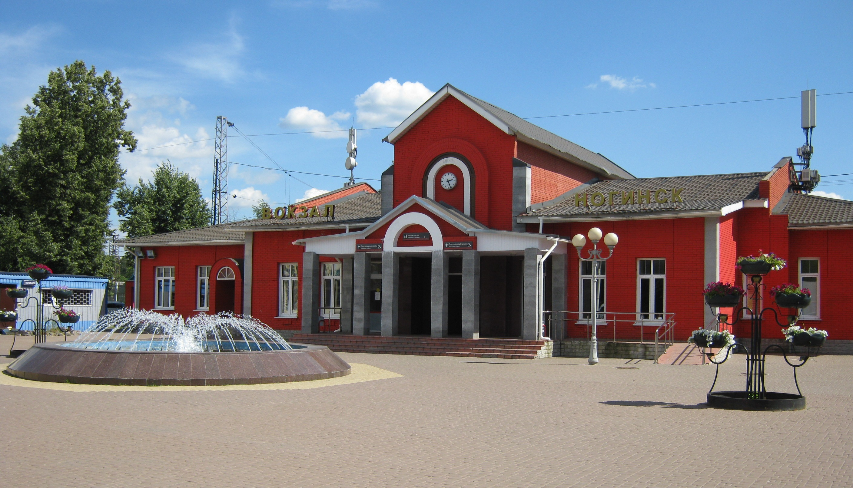 Железнодорожный вокзал в Ногинске